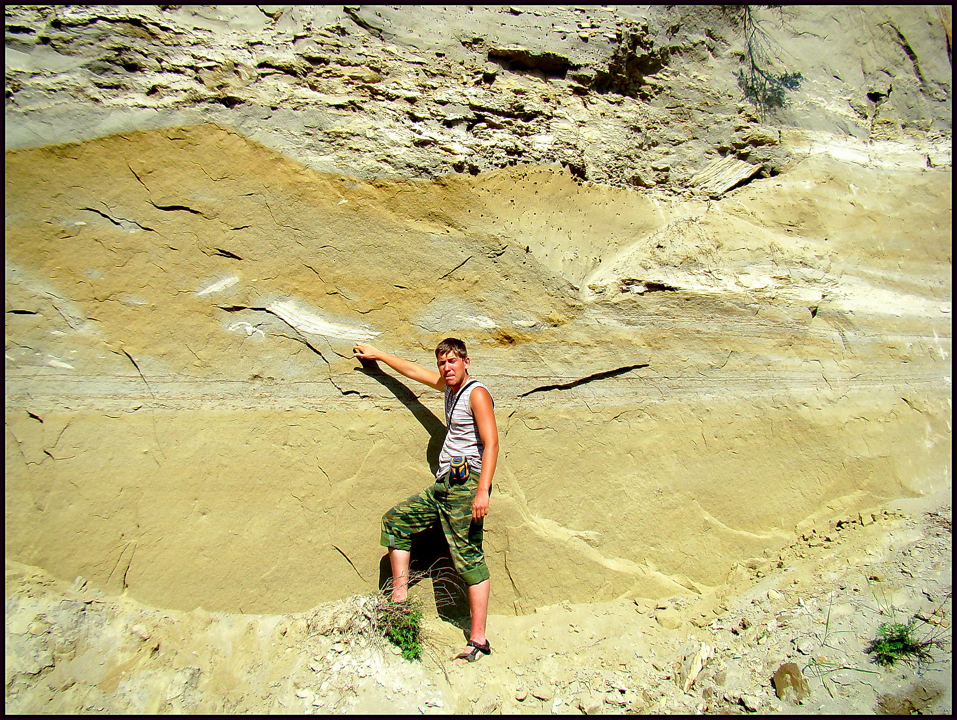 Дислокации первоначально субгоризонтально залегающих озёрных песчанистых глин, возникшие в результате подводных оползней и, возможно, стресса позднее вдигающихся здесь ледниковых льдов. Разрез Беле, Горный Алтай.